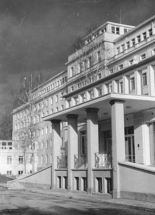 Dresden, Medizinische Akademie, chirurgische Klinik Zentralbild Höhne-Pohl 17.1.1956 Neue chirurgische Klinik der Dresdner Medizinischen Akademie übergeben. Ständig verbessern sich die sozialen Einrichtungen in unserer Republik. Eine neue chirurgische Klinik der Medizinischen Akademie "Carl Gustav Carus" im Krankenhaus Dresden-Johannstadt ist am Sonntag, dem 15.1.1956, feierlich ihrer Bestimmung übergeben worden. Die moderne Klinik verfügt u.a. über 320 (drei zwei null) Betten, überwiegend in Zwei- und Dreibett-Zimmern, und sechs Operationssäle mit Klimaanlage. Über 6 (sechs) Millionen DM hat die Regierung der Deutschen Demokratischen Republik für den Bau dieser chirurgischen Klinik ausgegeben, die die grösste und modernste in Deutschland sein wird, und die den werktätigen Menschen gehört. UBz: Die neue chirurgische Klinik. Der großzügige, architektonisch modern angelegte Bau macht den Eindruck eines Sanatoriums. Licht, Luft und Sonne können ungehindert in die Räume.